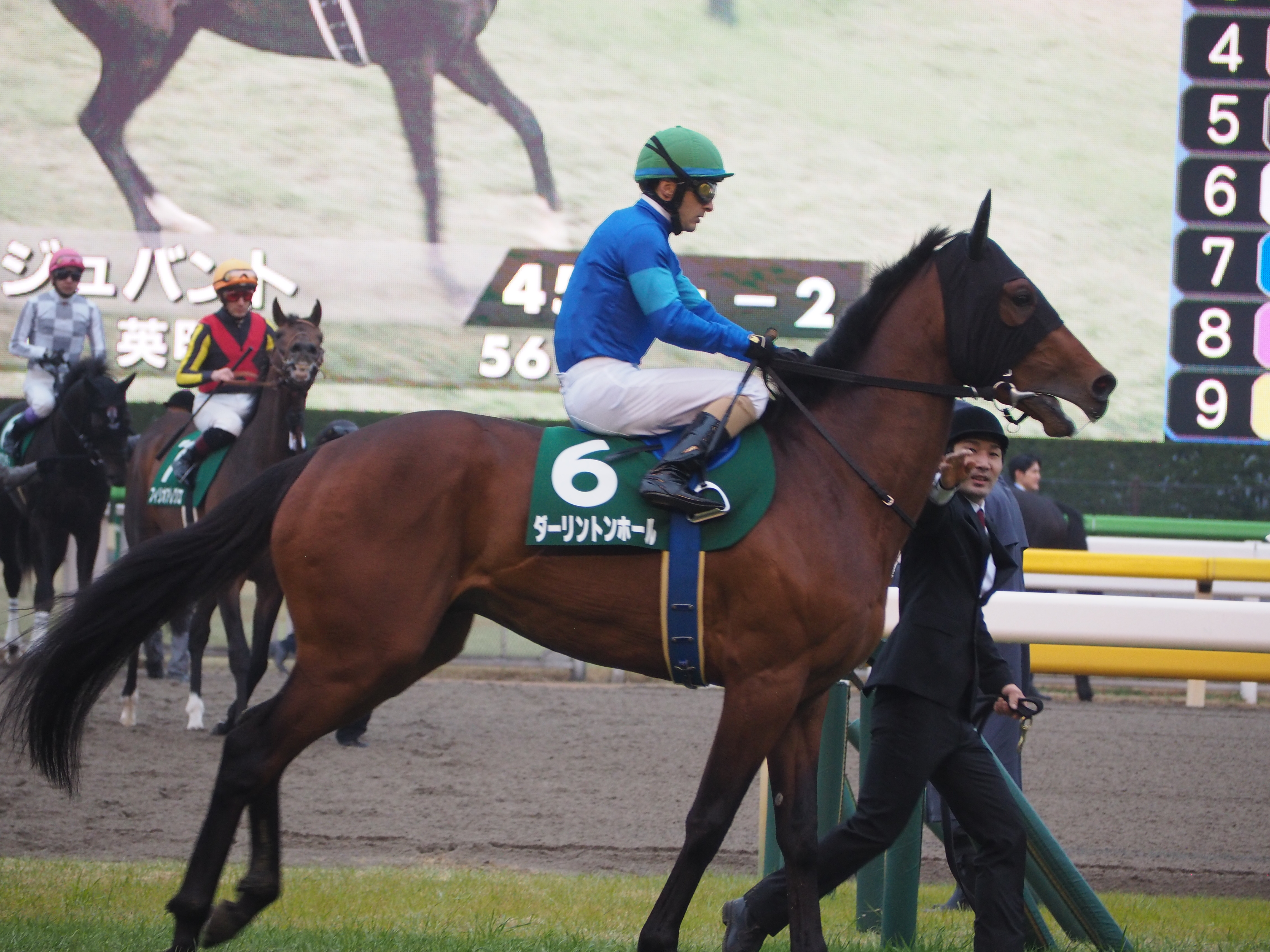 2020年の共同通信杯、本馬場入場をするダーリントンホール